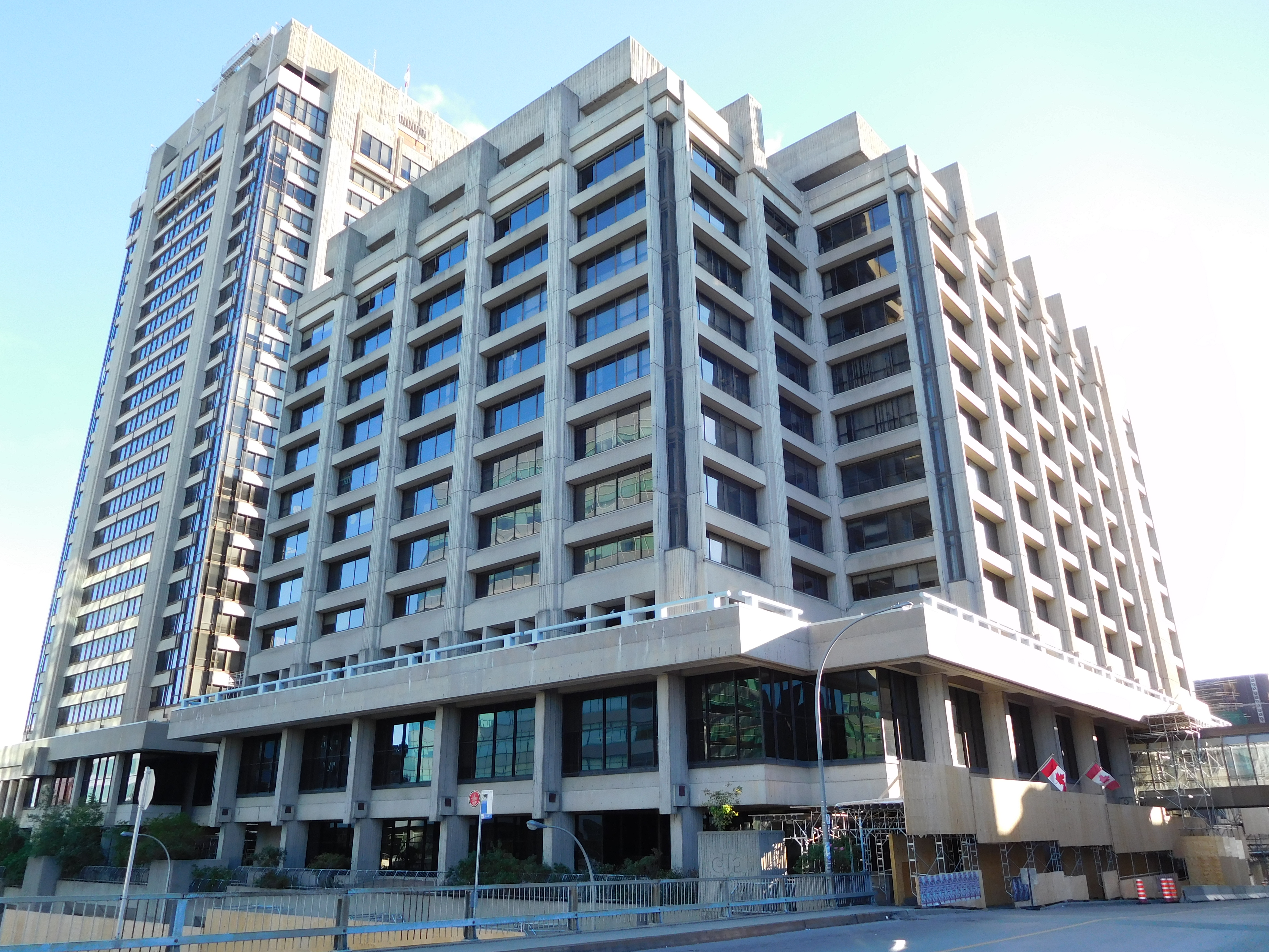 Place du Portage I et II, Gatineau Vue de la rue de l'Hôtel-de-Ville, sur un pont au-dessus du boulevard Maisonneuve Portage I, situé au 50, rue Victoria, a été construit entre 1969 et 1973, et compte 25 étages au-dessus du sol. emporis.fr Portage II, situé au 165, rue de l'Hôtel-de-Ville, a été terminé en 1973, et compte 11 étages. emporis.fr